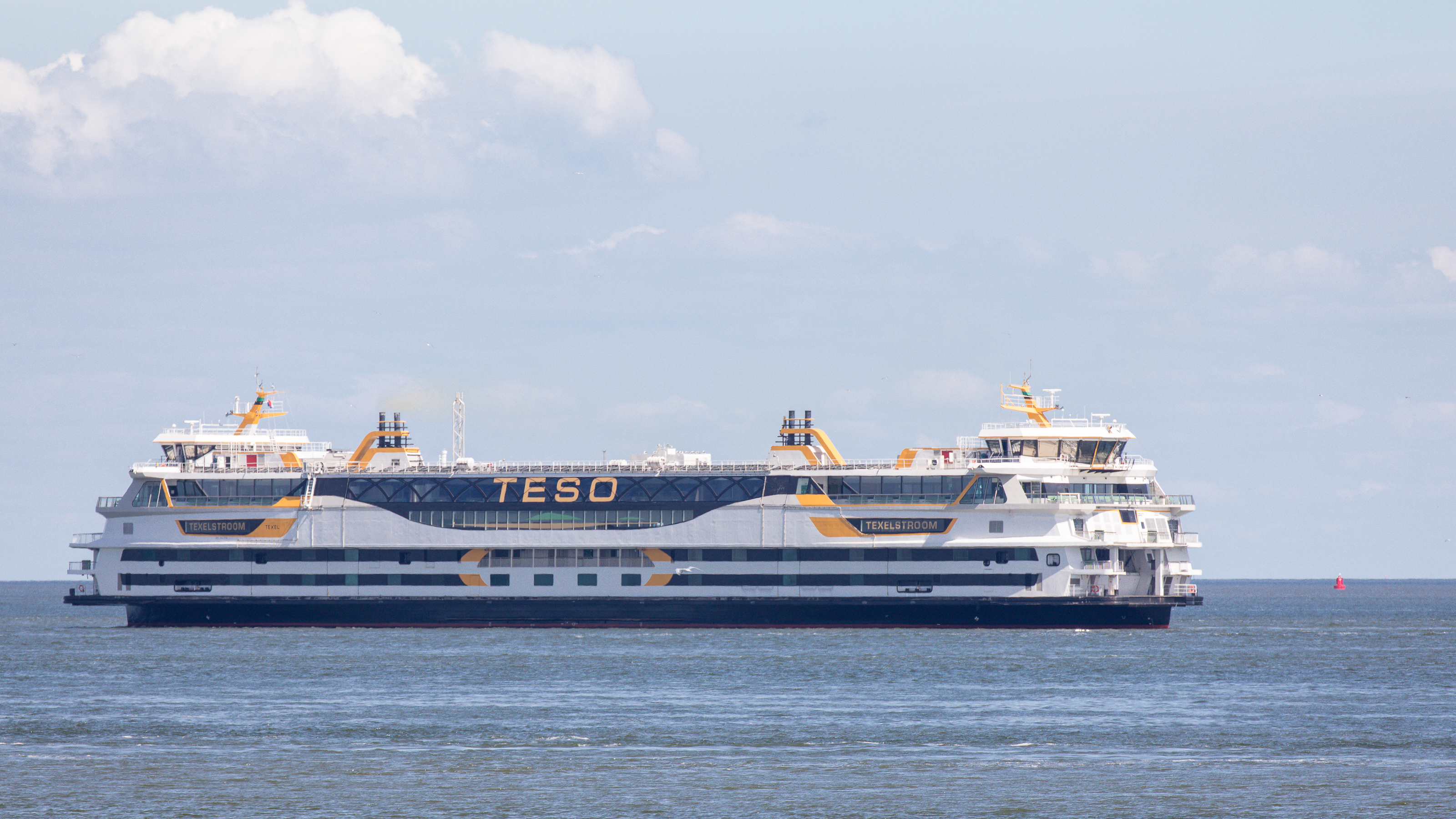 Fähre MS "Texelstroom" vor 't Horntje auf Reede